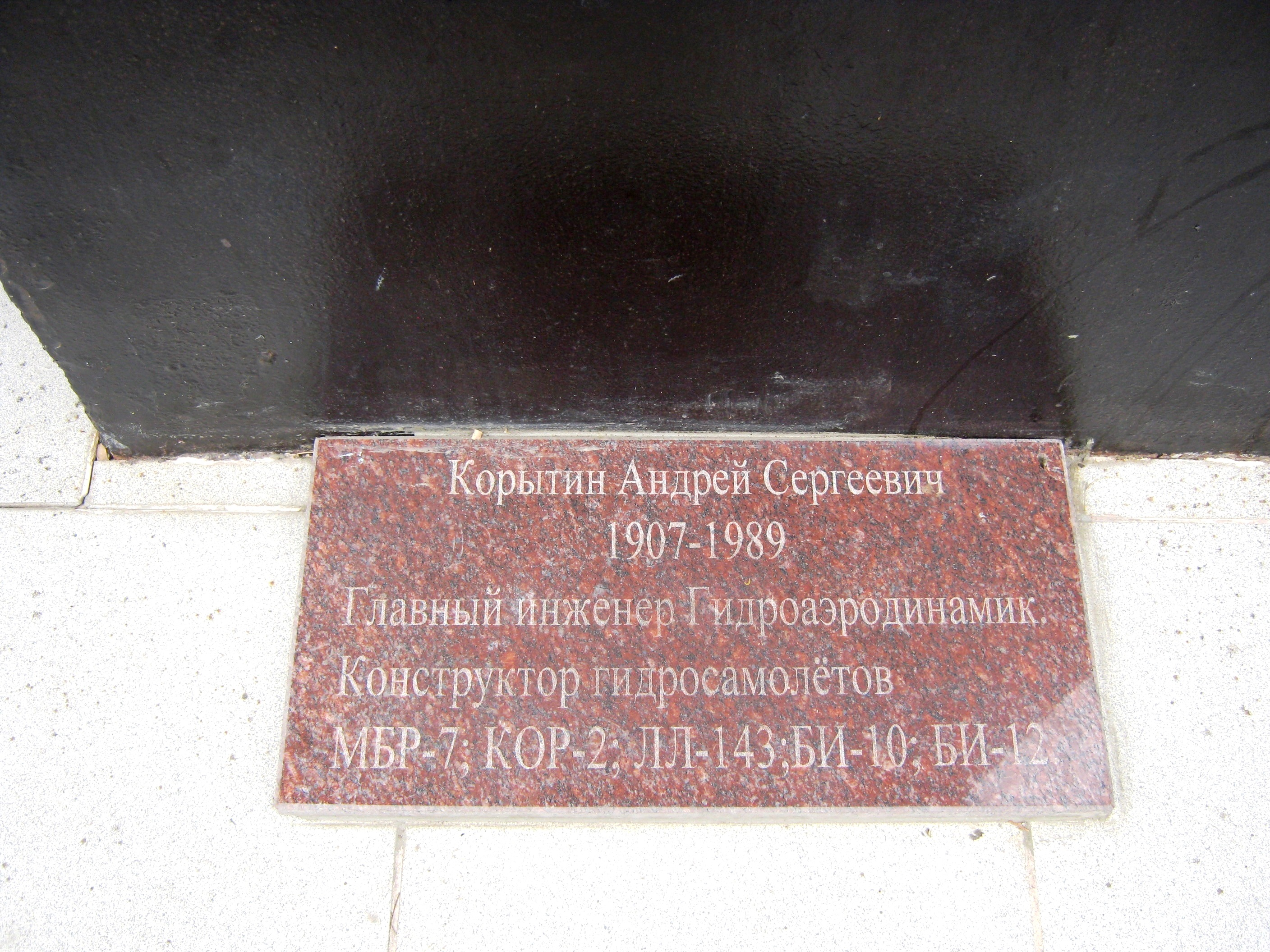 Табличка на памятнике Корытину (Анапа)